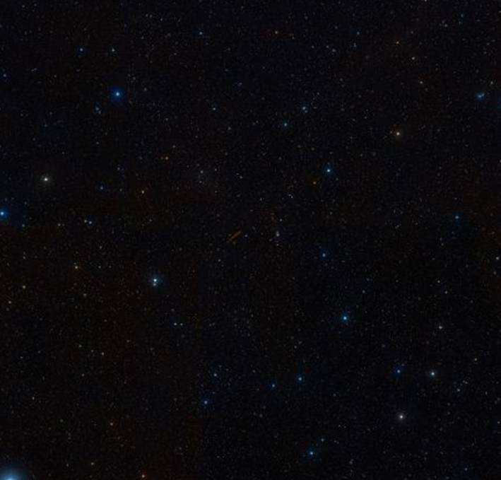 Draco Dwarf